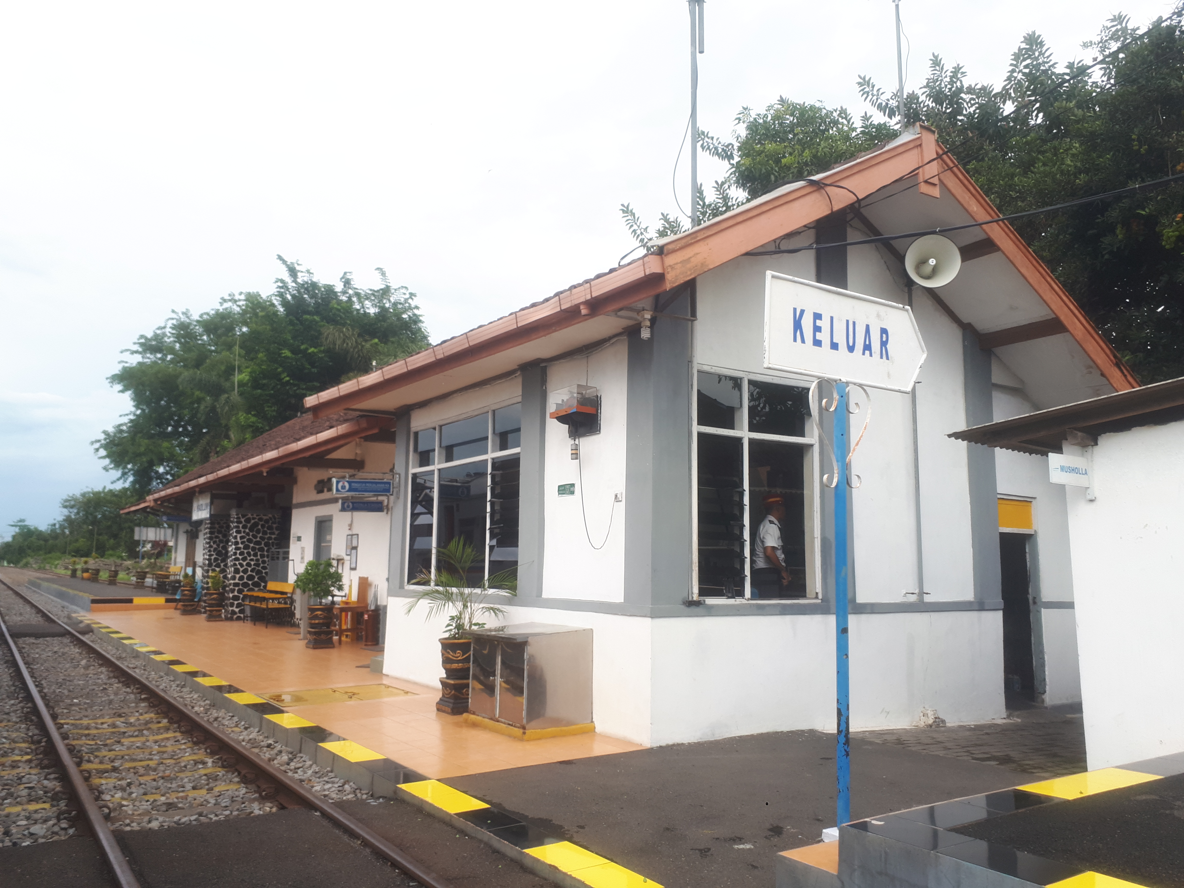 Stasiun Ngadiluwih pada tahun 2020